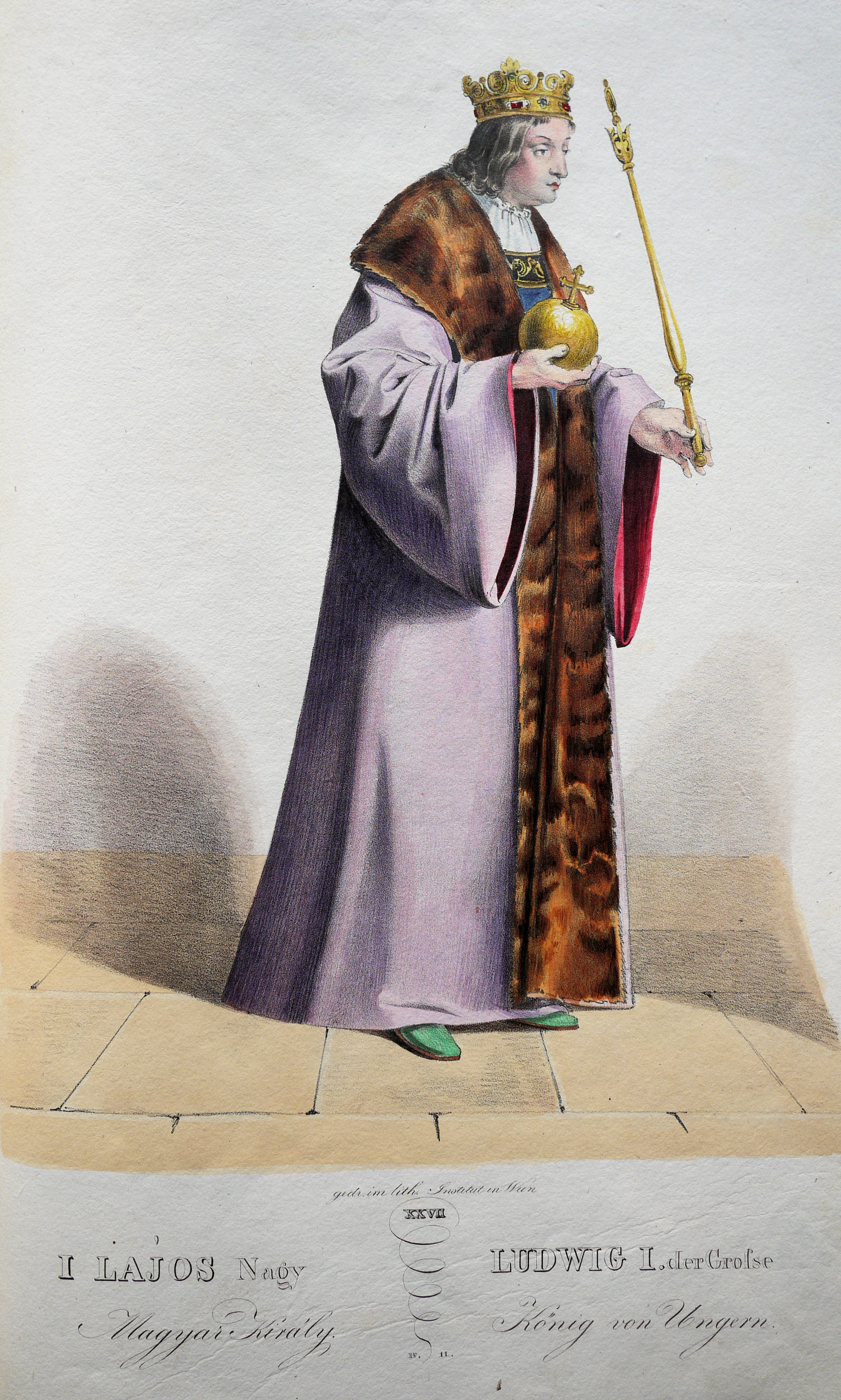 Ludwig I. (1326-1388), König von Polen und Ungarn. Lithographie von Josef Kriehuber nach einer Zeichnung von Moritz von Schwind aus Ungerns Erste Heerführer Herzoge und Koenige In einer Reihe von Bildnissen von Bela bis auf Seine Majestät Franz I. Kaiser Von Österreich König Von Ungern &c., &c. Wien : Lithographisches Institut ;ca. 1828